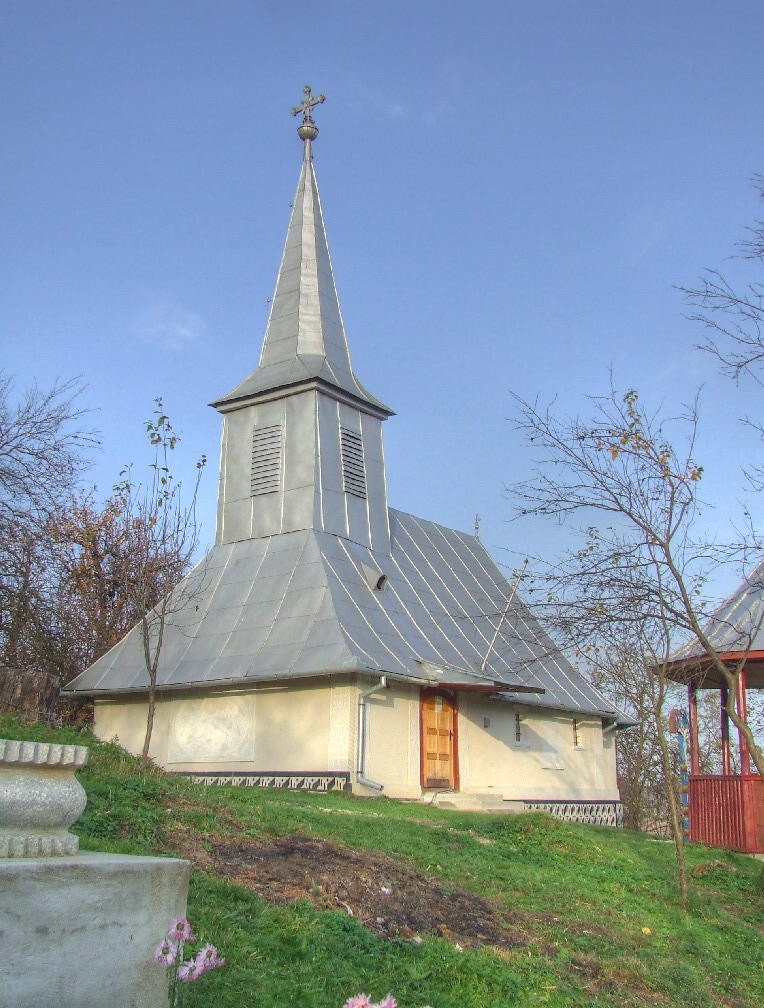 Biserica de lemn din Cătălina, județul Cluj.